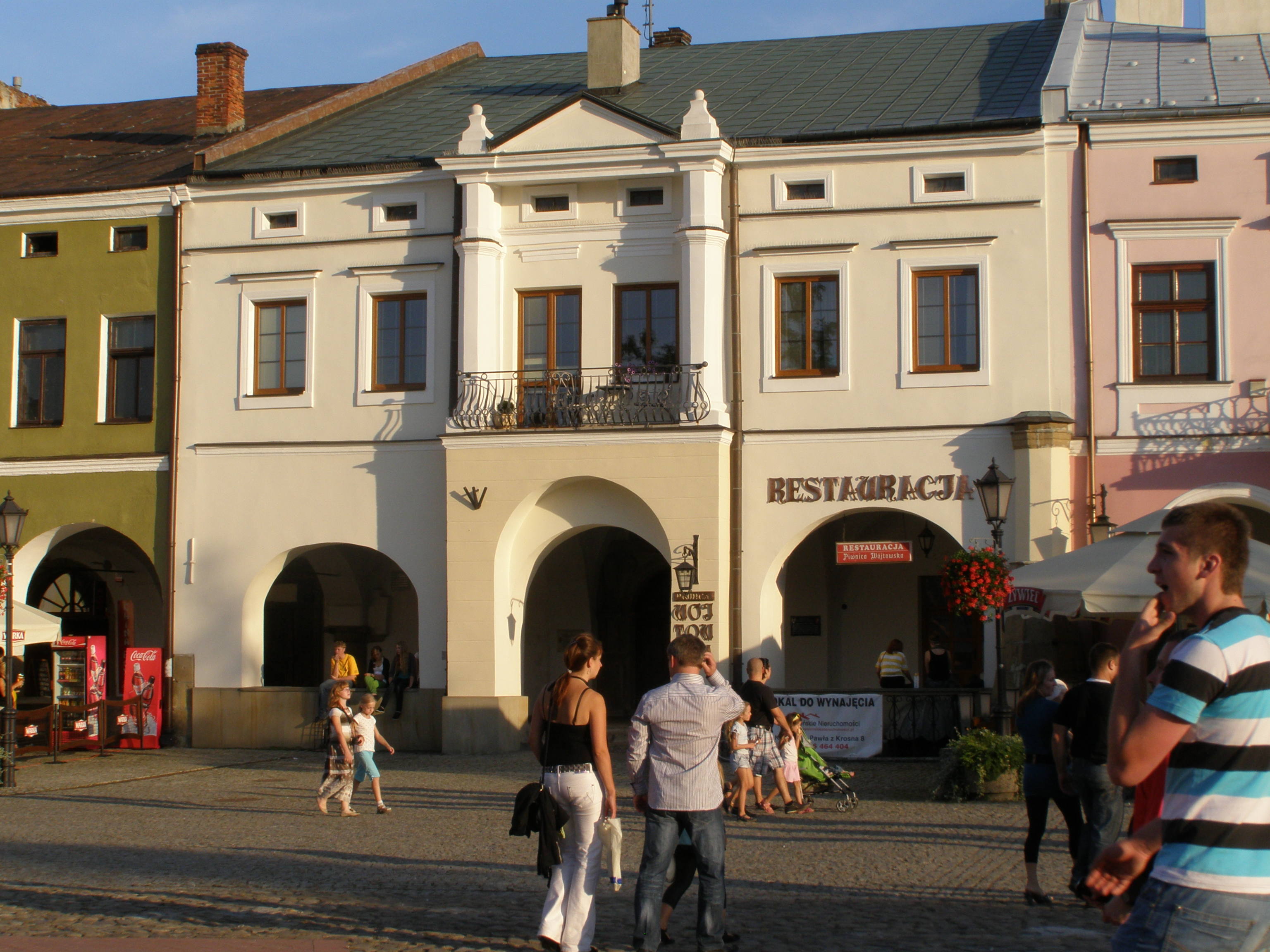 Krosno - Kamienica Wójtowska, ul. Rynek 7